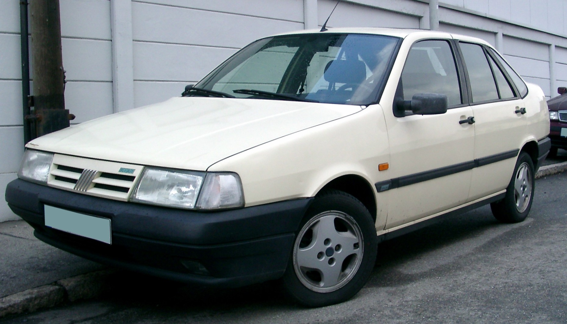 Fiat Tempra